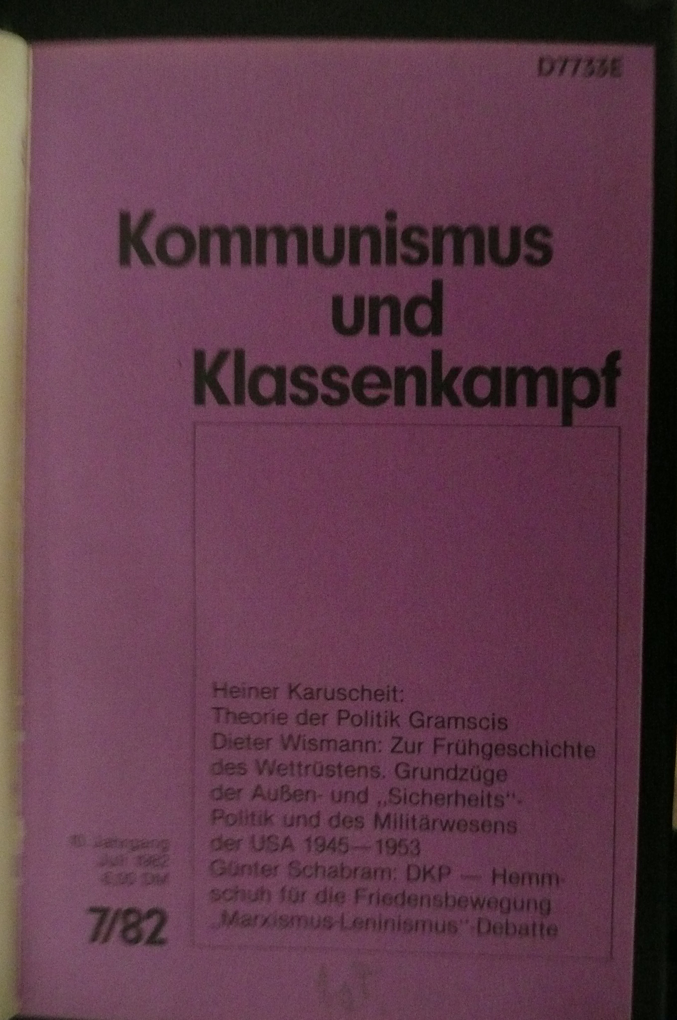 Kommunismus und Klassenkampf, Juli 1982, eigene Aufnahme